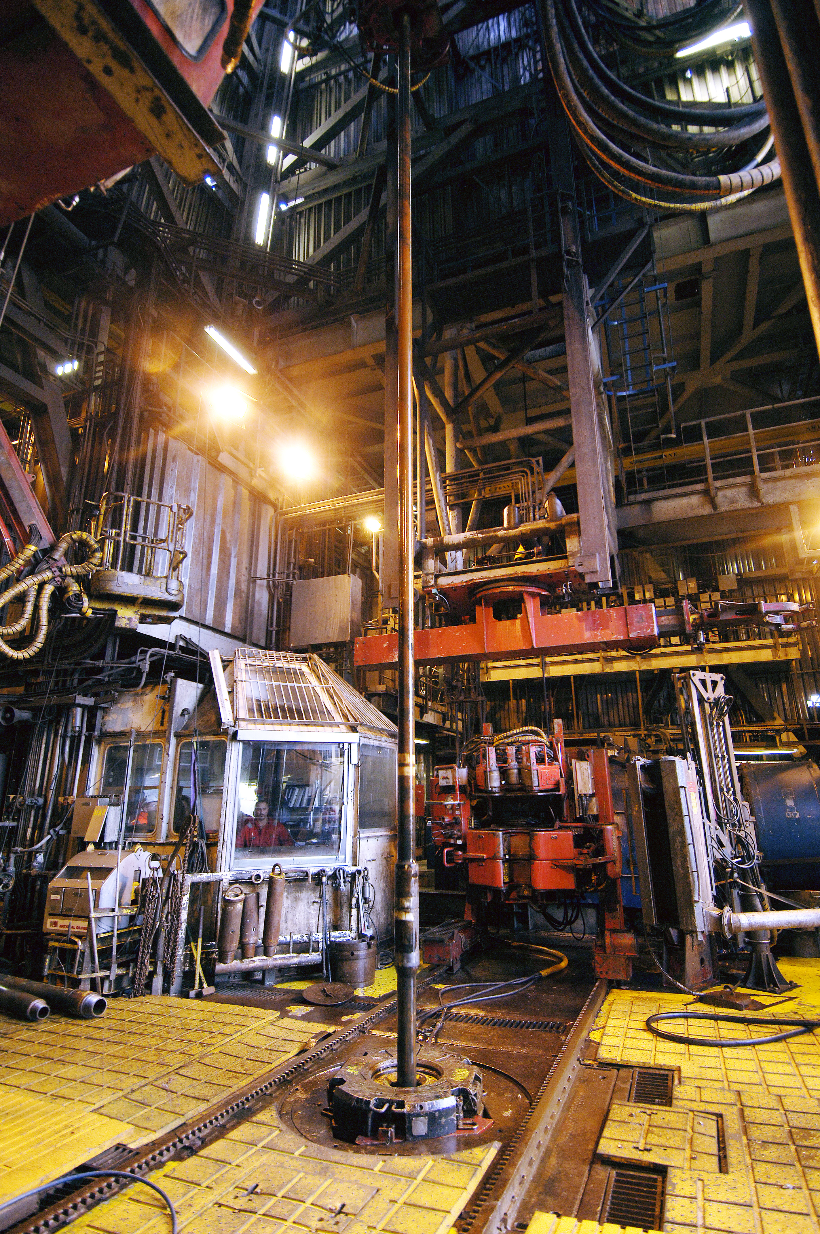 Foto: Norsk olje og gass/Tom Haga Oseberg feltsenter